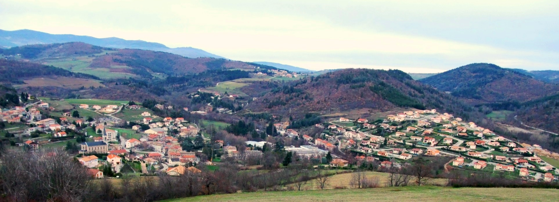 Saint-Marcel-lès-Annonay vu de loin